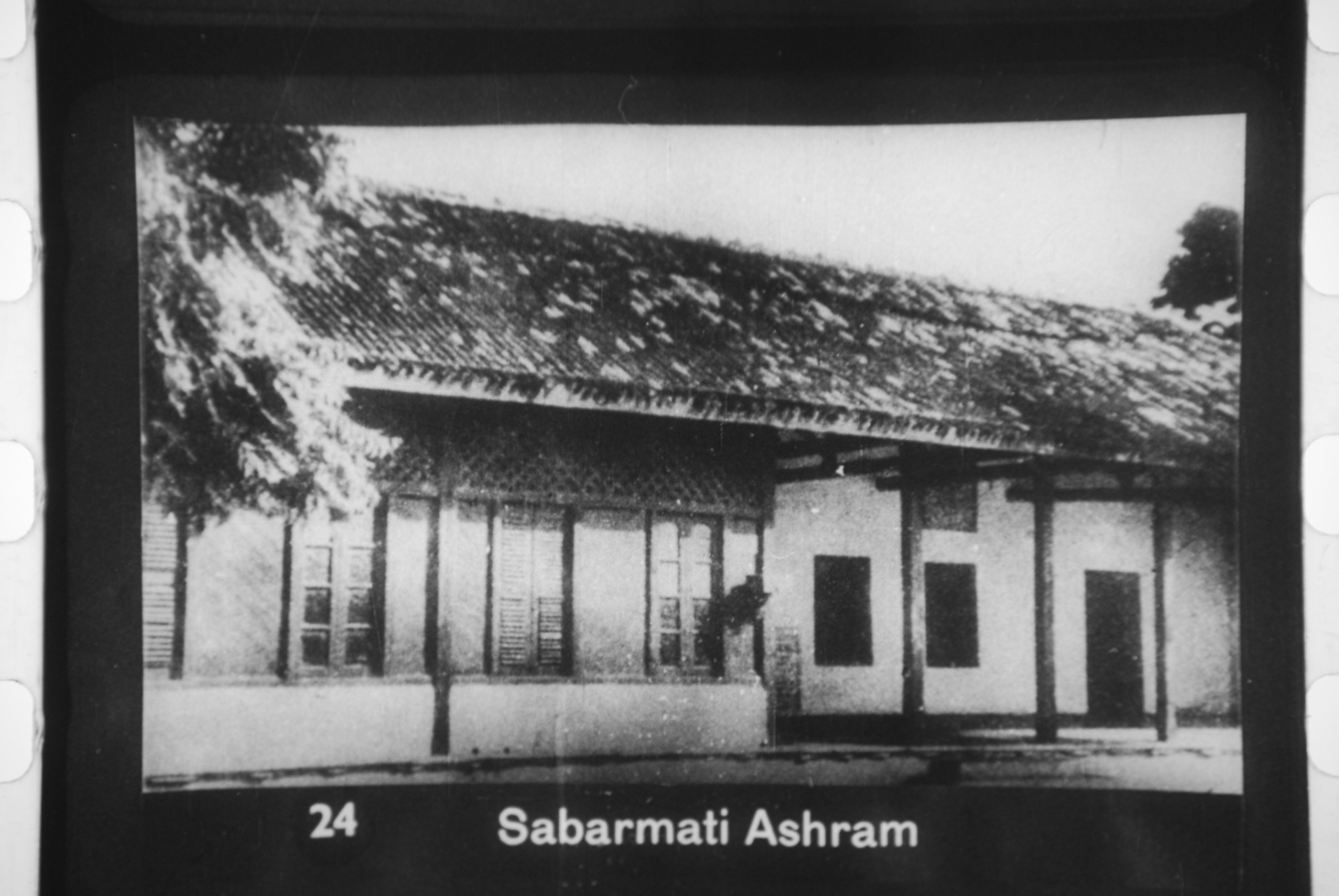 Sabarmati Ashram, Ahmedabad, India.